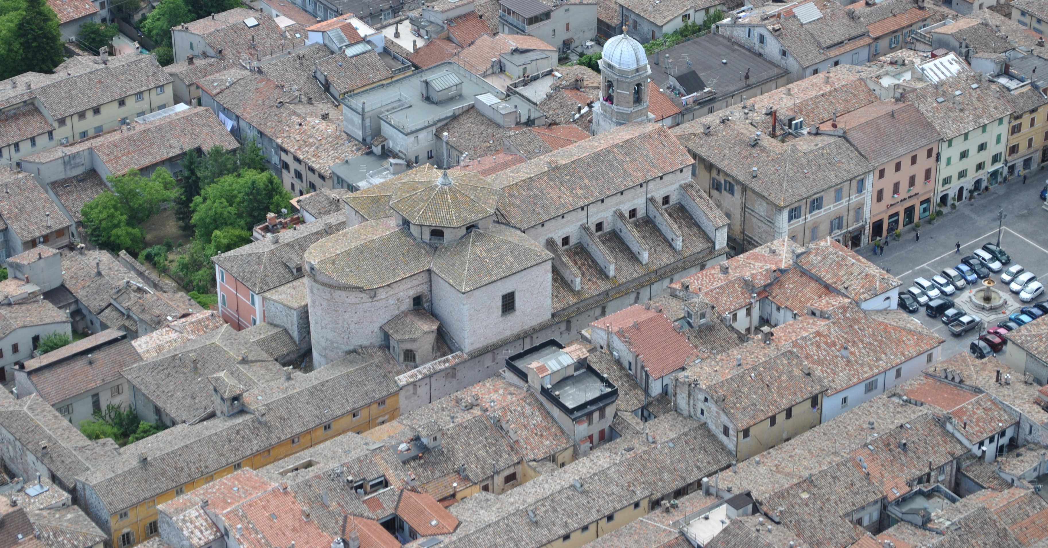 Cagli, Basilica Cattedrale, veduta aerea.